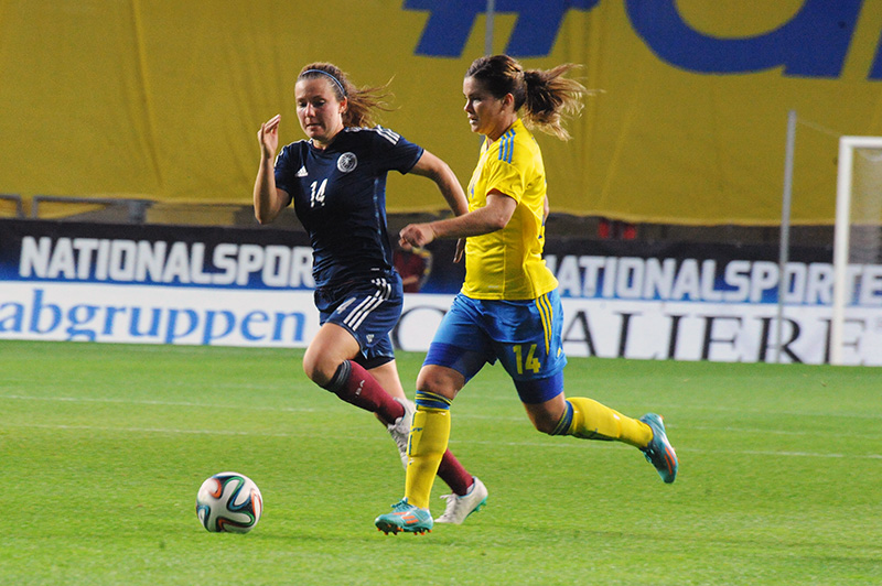 a_82_1906